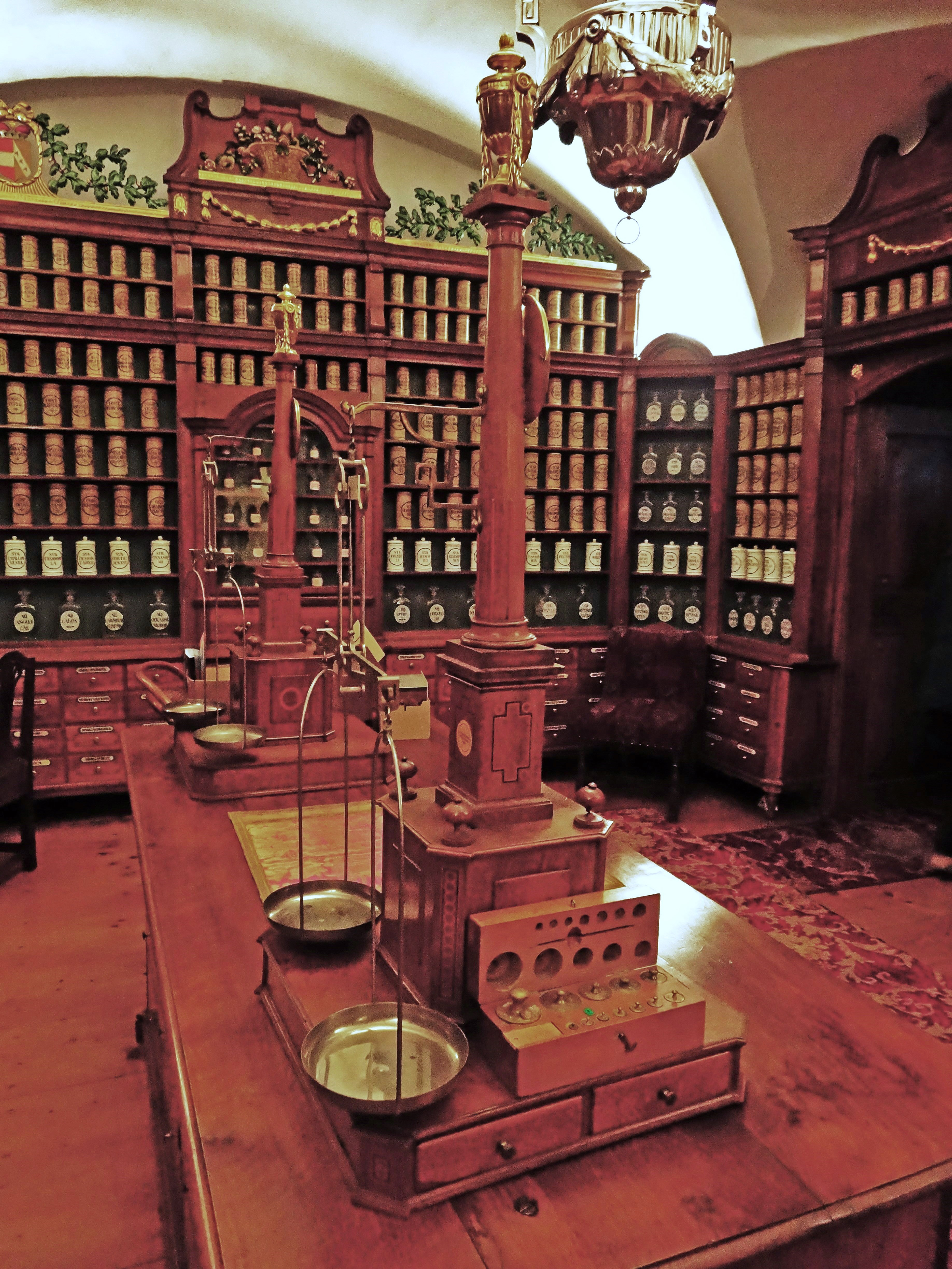 Elisabethinenkloster mit Spital, Klagenfurt. Die historische Spitalsapotheke (1792)